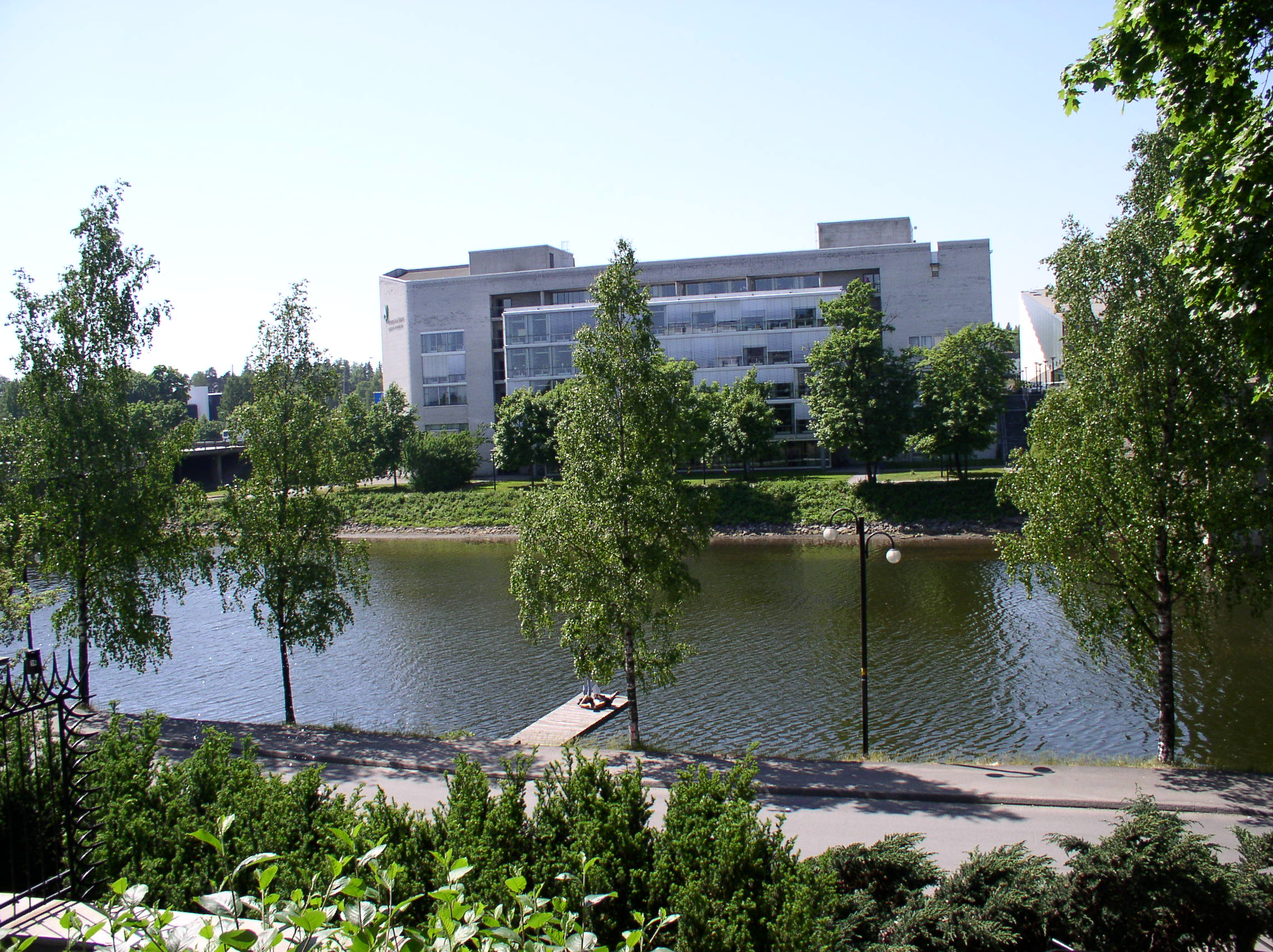 Kommunegården i Bærum med Sandvikselva i forgrunnen